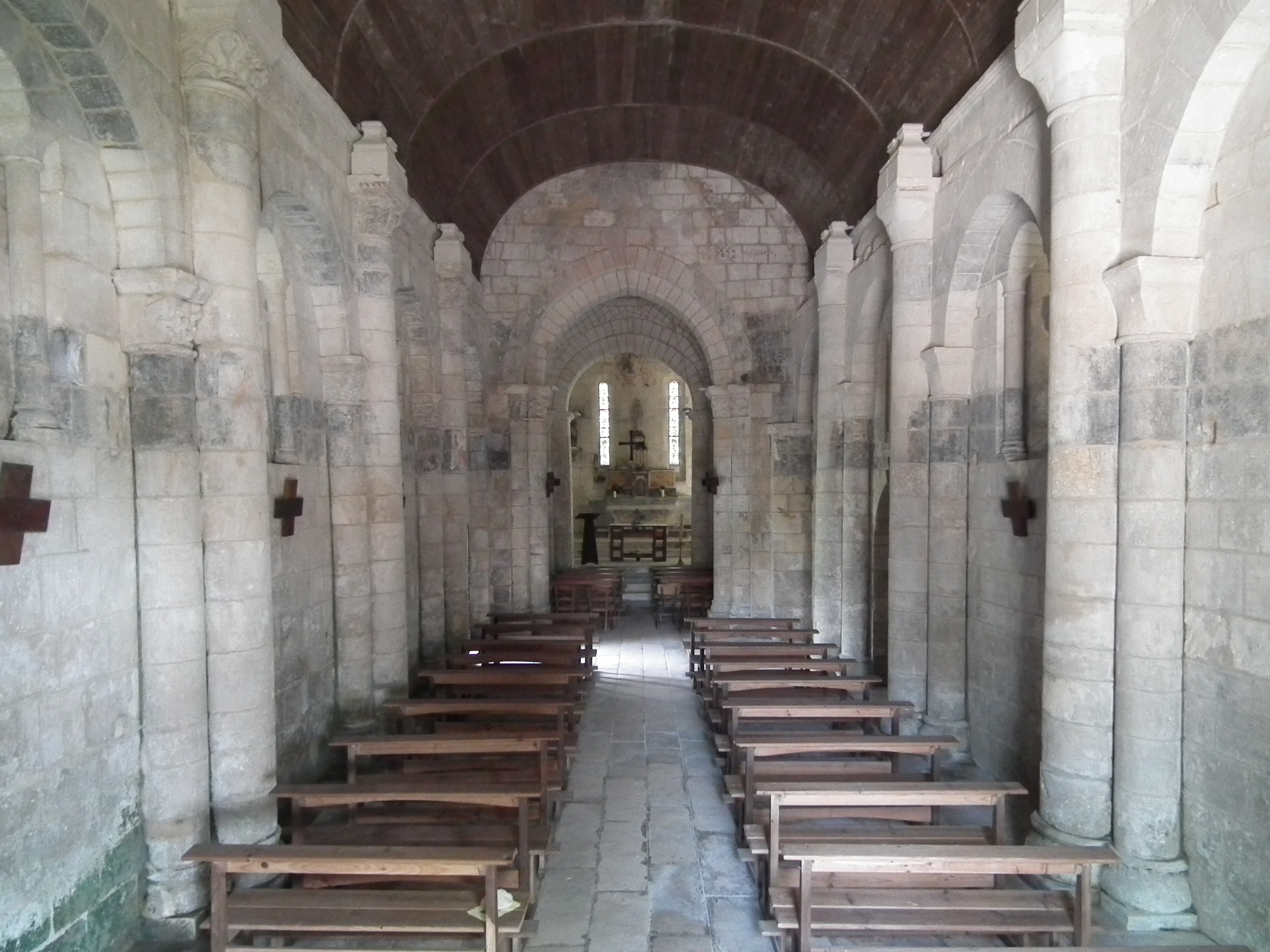 Intérieur de l'église de Biron